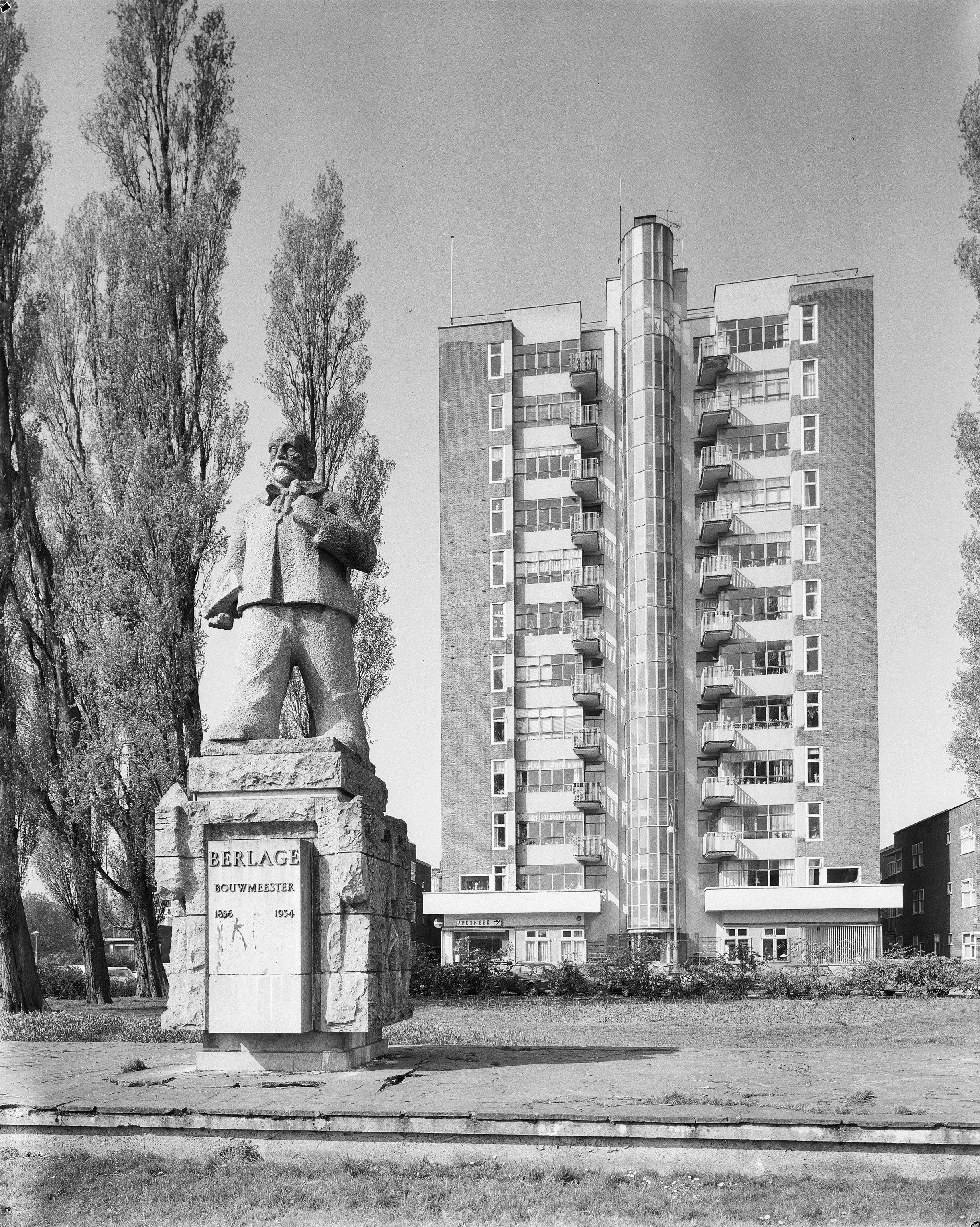 Wolkenkrabber voorzijde